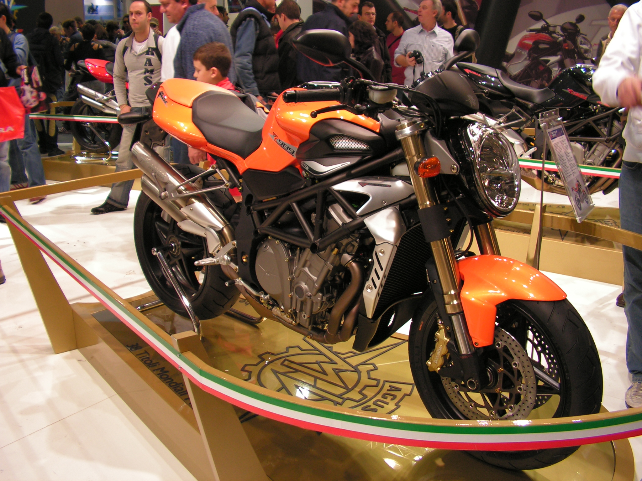 MV Agusta Brutale 989R - EICMA 2007, Milan (Italy)